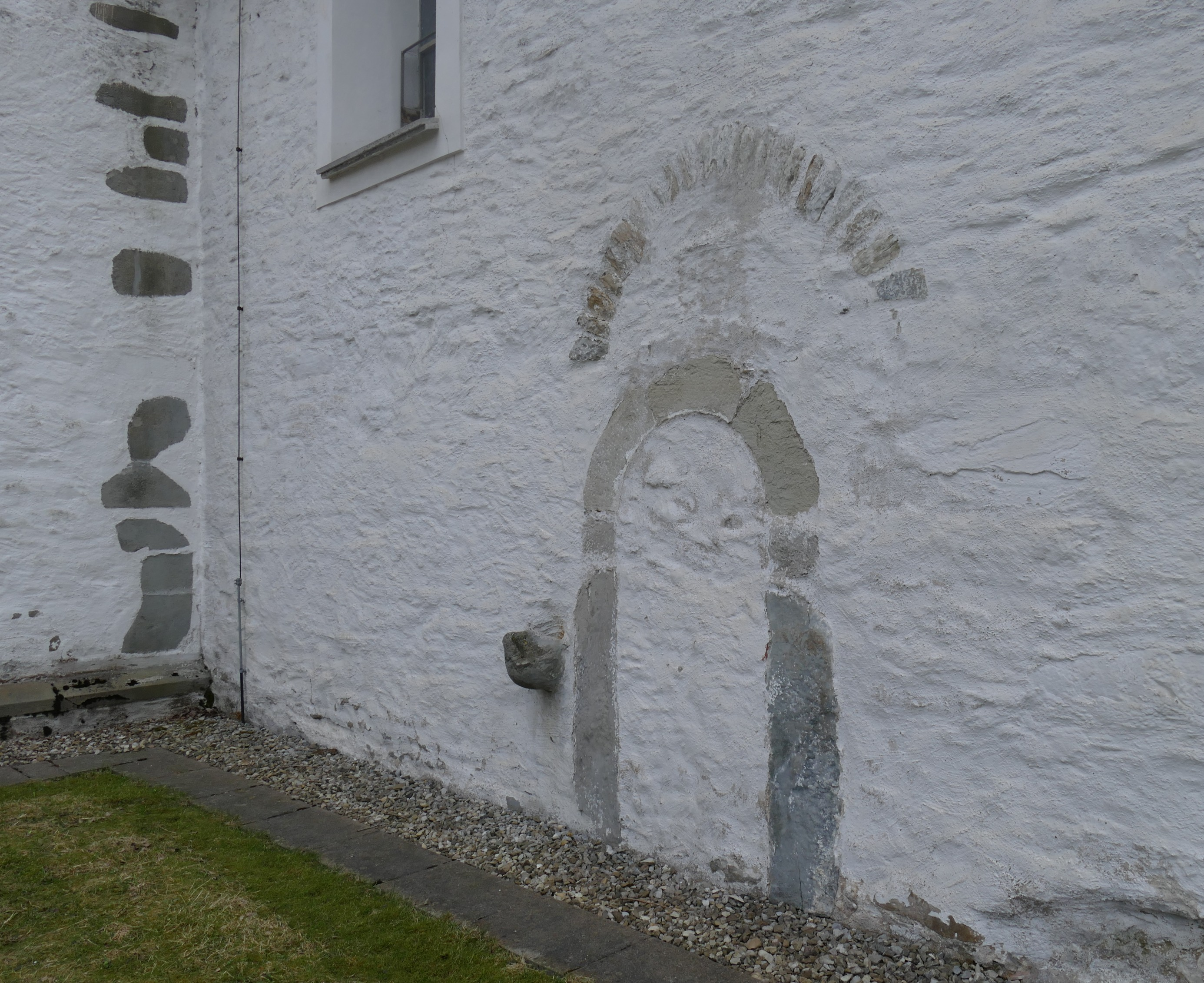 Rauns Kirche Nordseite mit zwei gut erhaltenen ehemaligen Eingängen